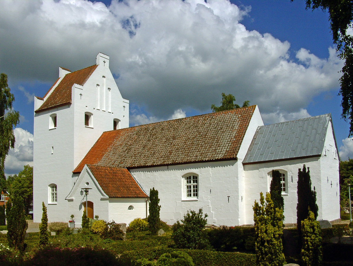 fra sydøst